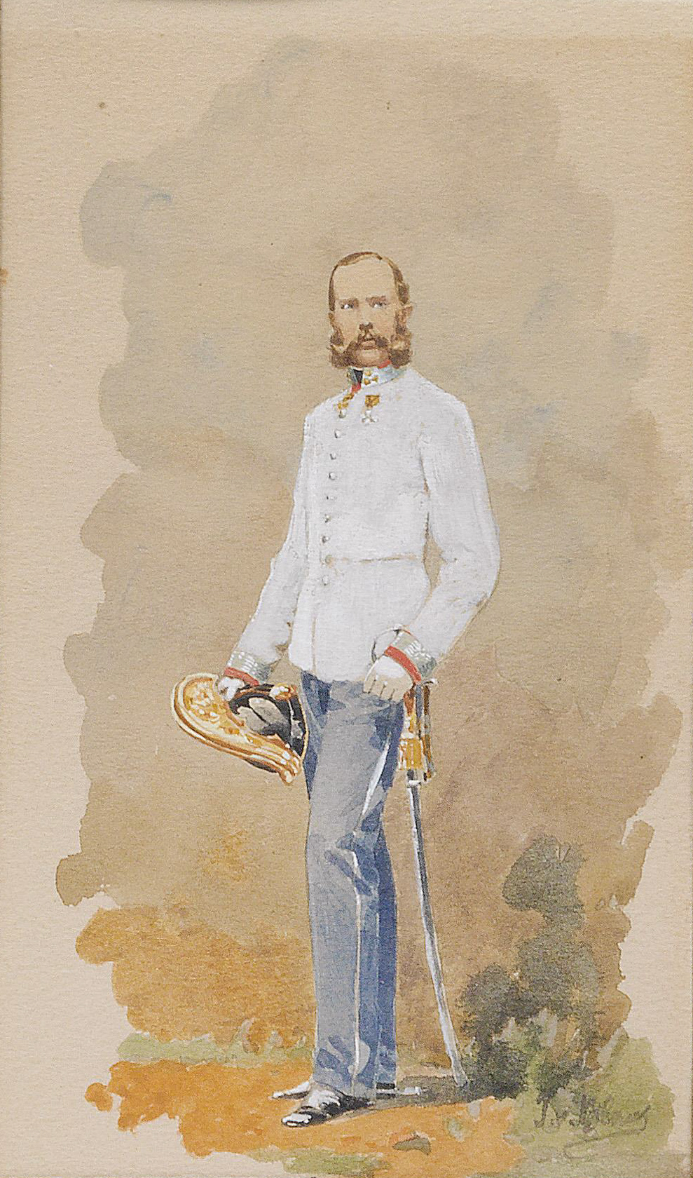 Kaiser Franz Joseph I. von Österreich in der Uniform des Dragoner-Regiments Nr. 11, Aquarell auf Papier, signiert "J. v. Blaas", 18 x 10,5 cm; wohl vor 1868